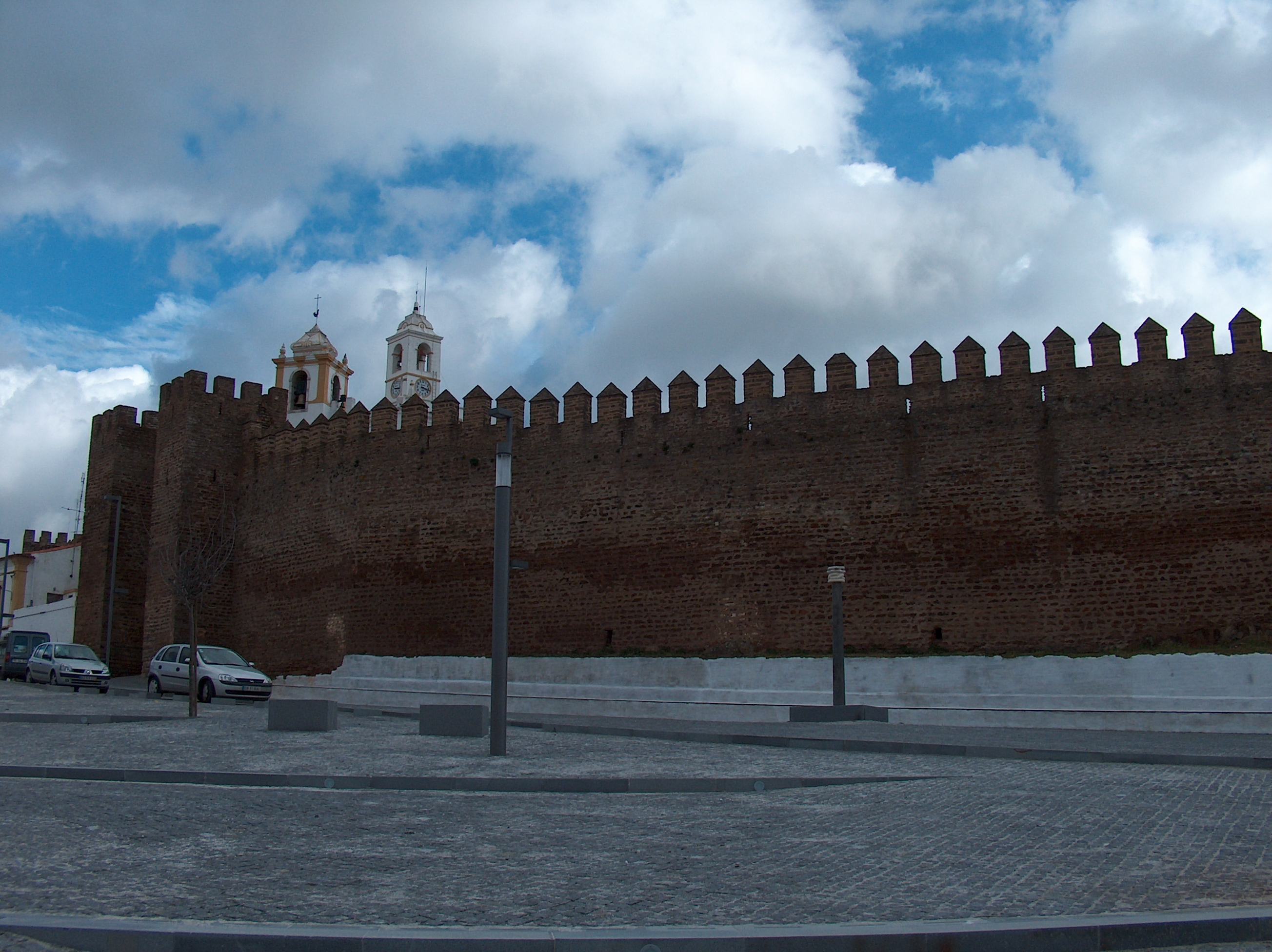 Castelo do Alandroal